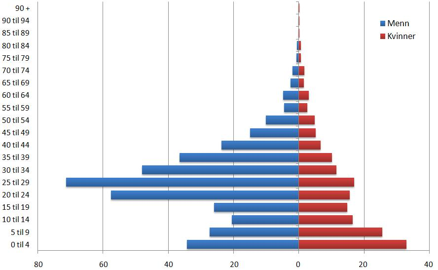 De Forente Arabiske Emiraters befolkningspyramide fra 1975 (per tusen)